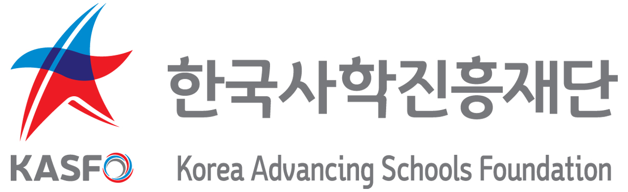 한국사학진흥재단